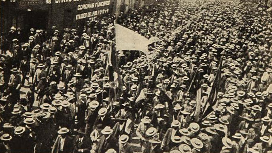 Imagen extraída del libro La masacre de la escuela Santa María de Iquique. Marcha obrera en Iquique, 1907